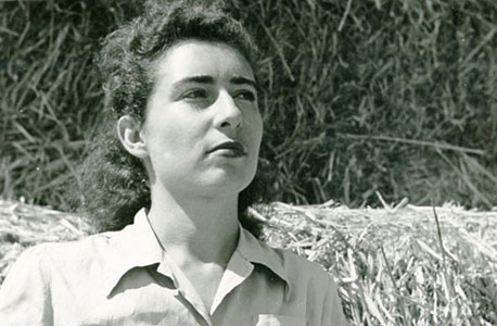 תמרה כהן